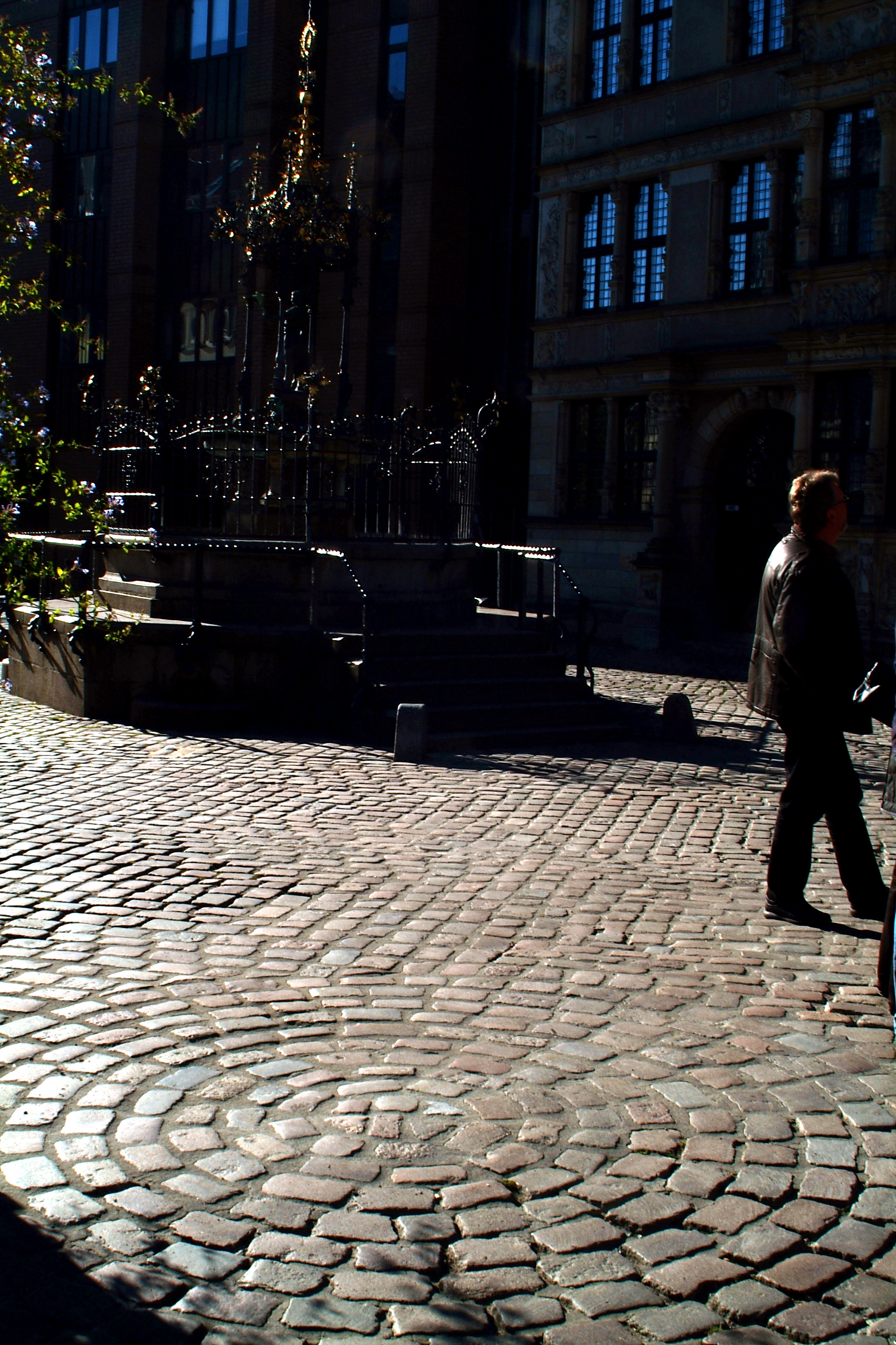 Der aus Pflastersteinen gelegte Kreis markiert den bei den Bauarbeiten des Leibnizhauses zufällig entdeckten Brunnen im Erdboden. Der namenlose Brunnen ist bis heute nicht erforscht. Im Hintergrund ist der "Holzmarktbrunnen zu sehen.